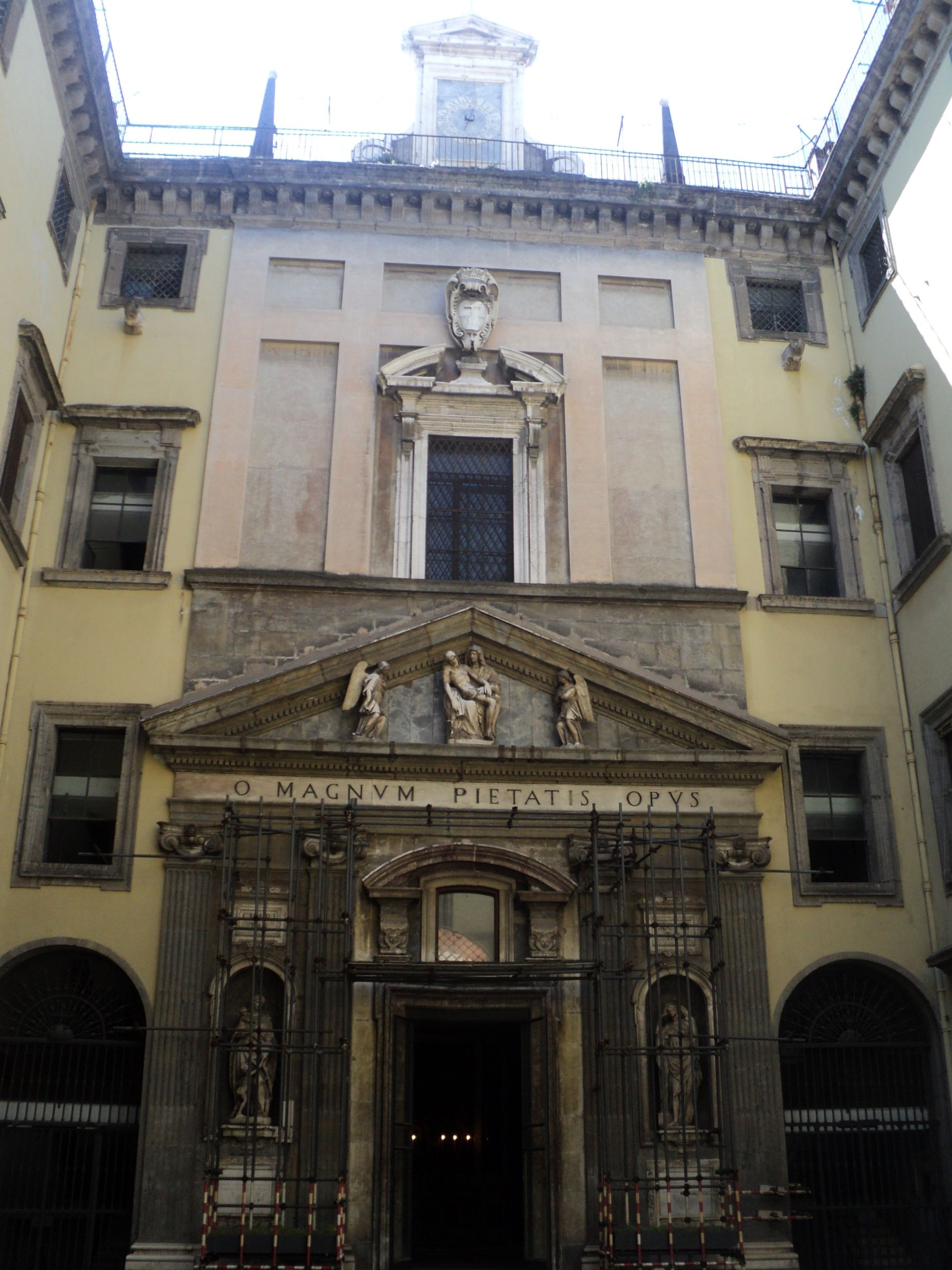 Cappella del Monte di Pietà (Napoli)